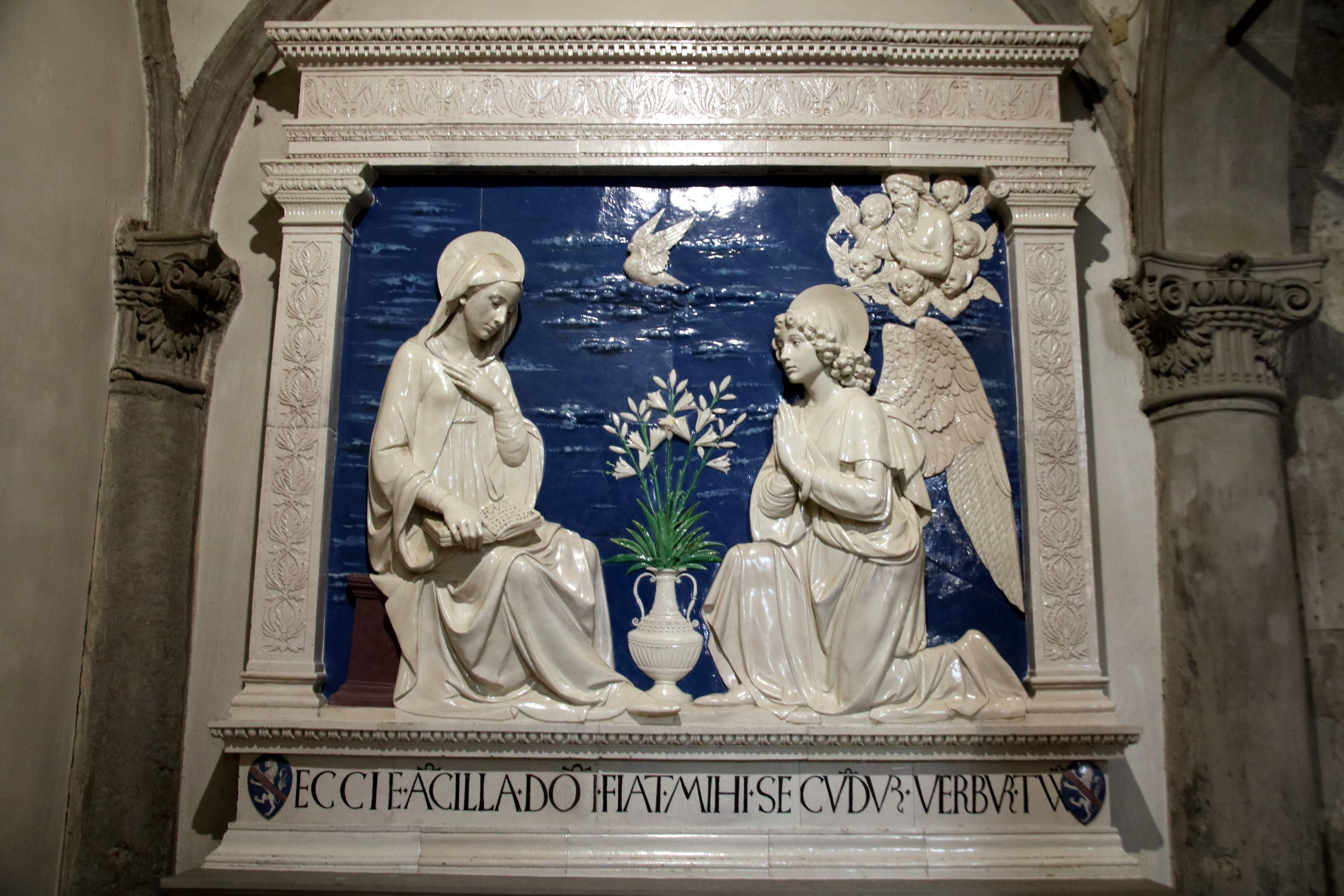 Andrea della Robbia, Annunciazione, 1475 circa, chiesa maggiore (La Verna)